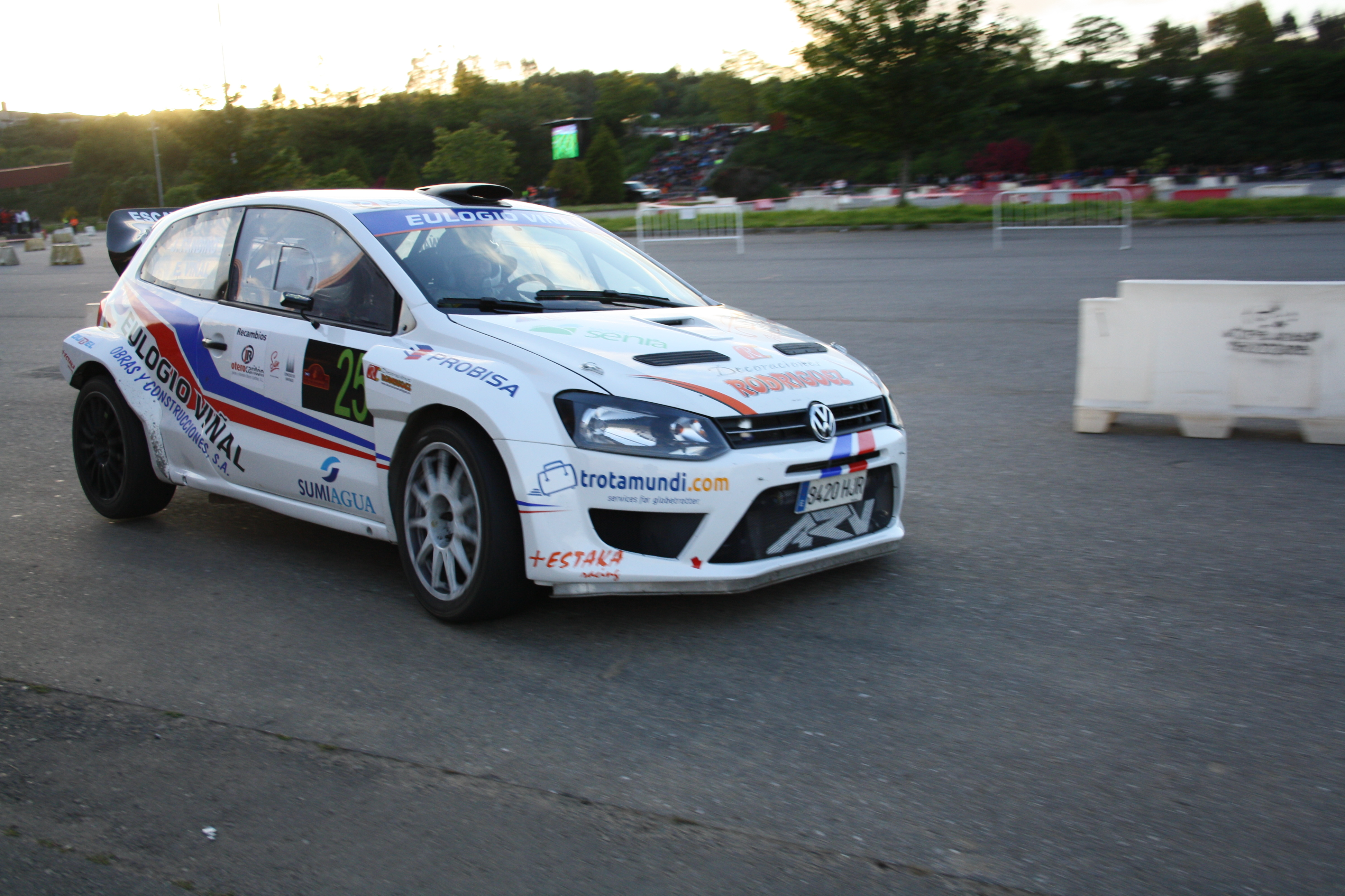 Volkswagen Polo N1 de Eulogio Viñal en el Rally Botafumeiro 2014. Unidad de Amador Vidal.